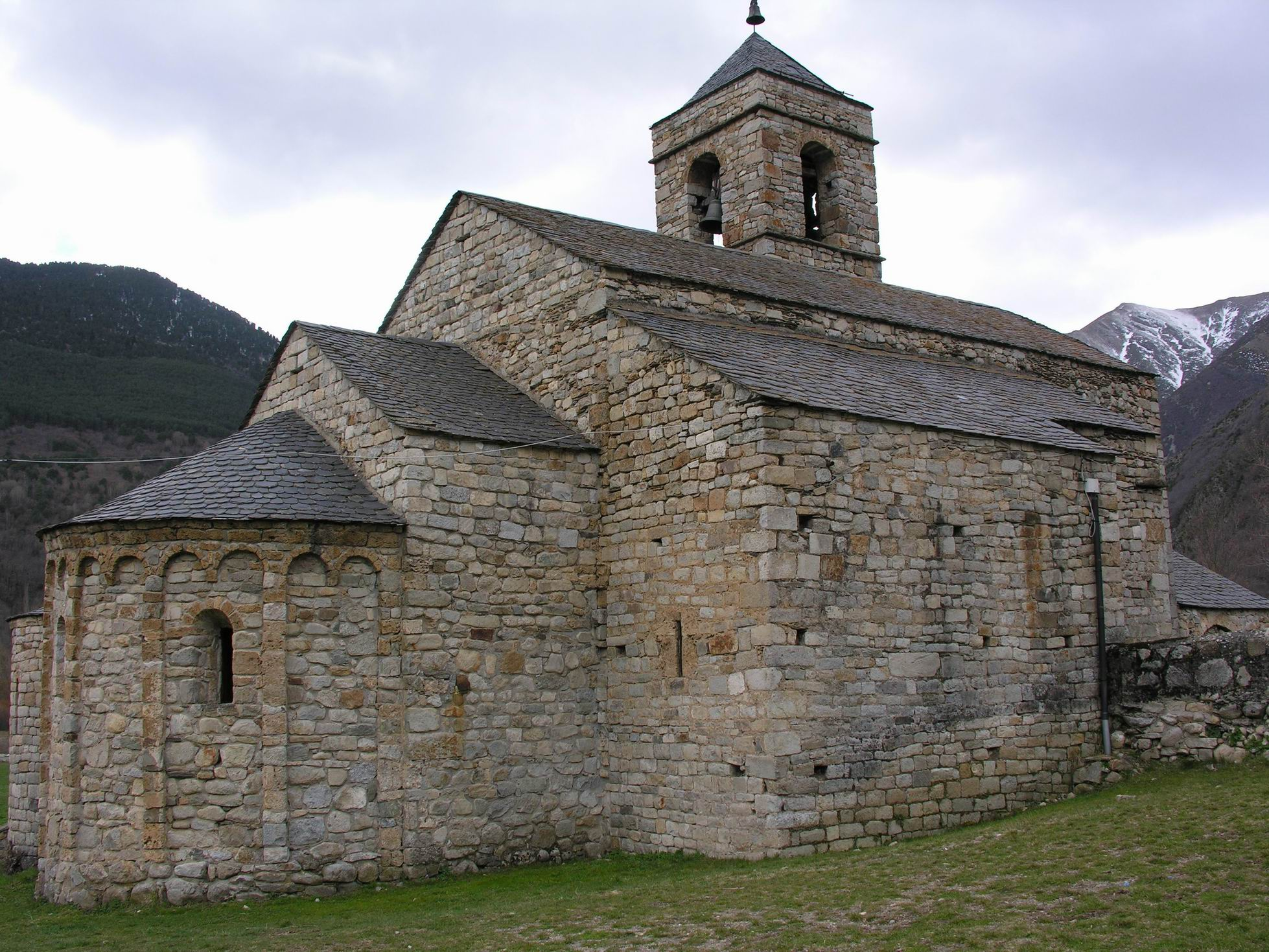 Vista des del nord-est